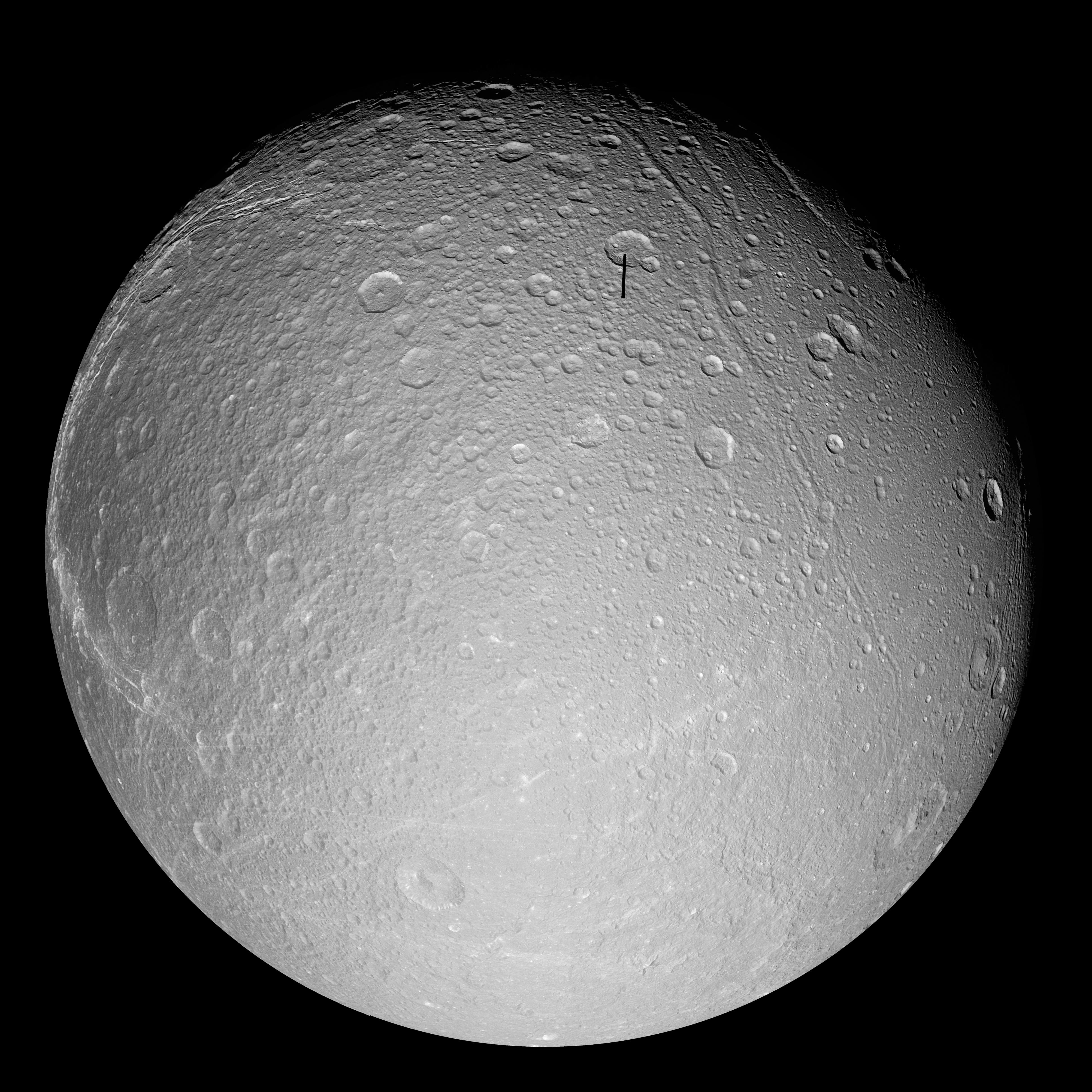 Saturnmond Dione, Mosaikbild von der Raumsonde Cassini, Entfernung im Bereich 27 180 bis 55 280km